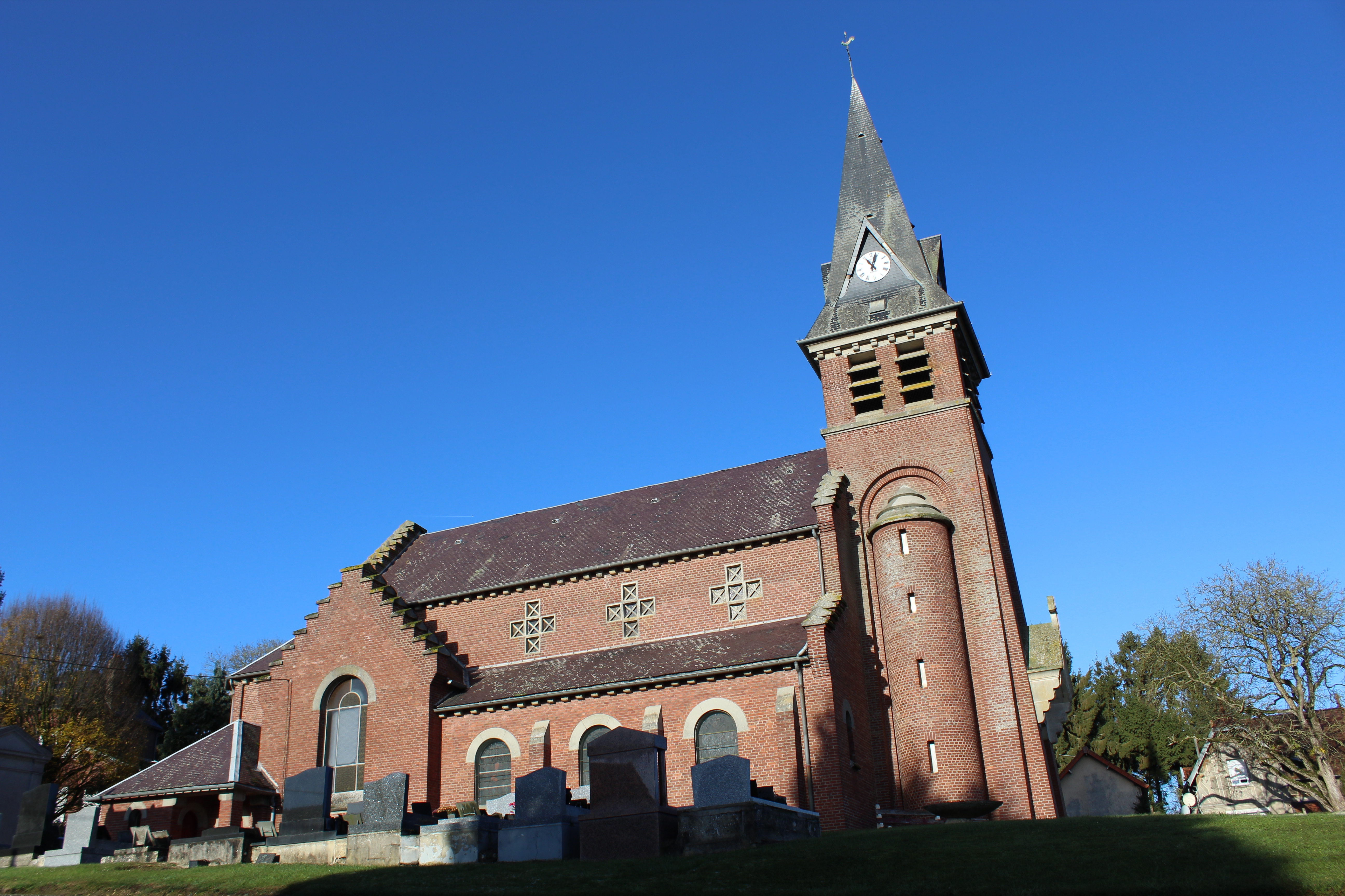 L'église de Hargicourt (Aisne)